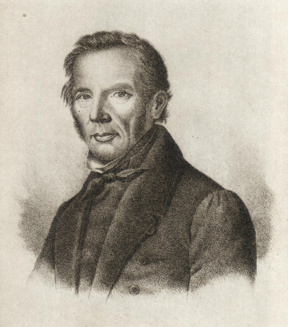 Carl Georg Brunius (1792-1869), professor